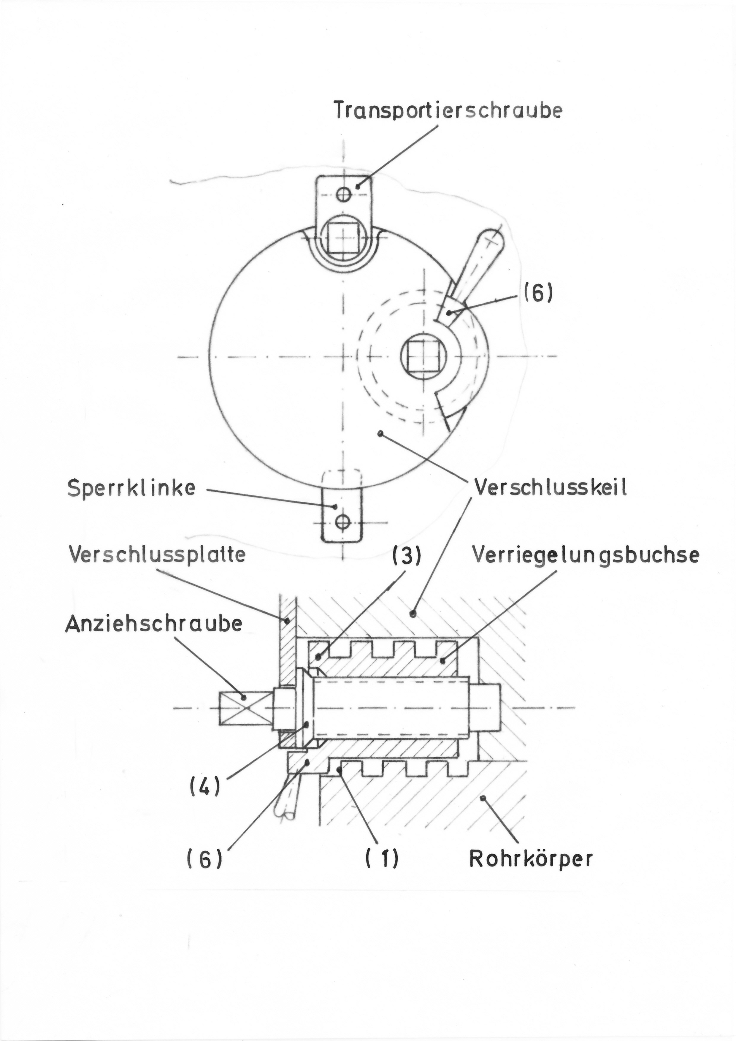 Krupp'scher Rundkeil C 1868. Das Bild stellt den Verschluss dar, wie er um 1867 in Russland verwendet wurde. Es wurde gestaltet nach: Anton Zdenek: Notizen über königlich russische Artillerie. In: K.K. Artilleriekomitee: Mitteilungen über Gegenstände der Artillerie- und Kriegswissenschaften. Verlag: W. Braumüller, Wien 1869.